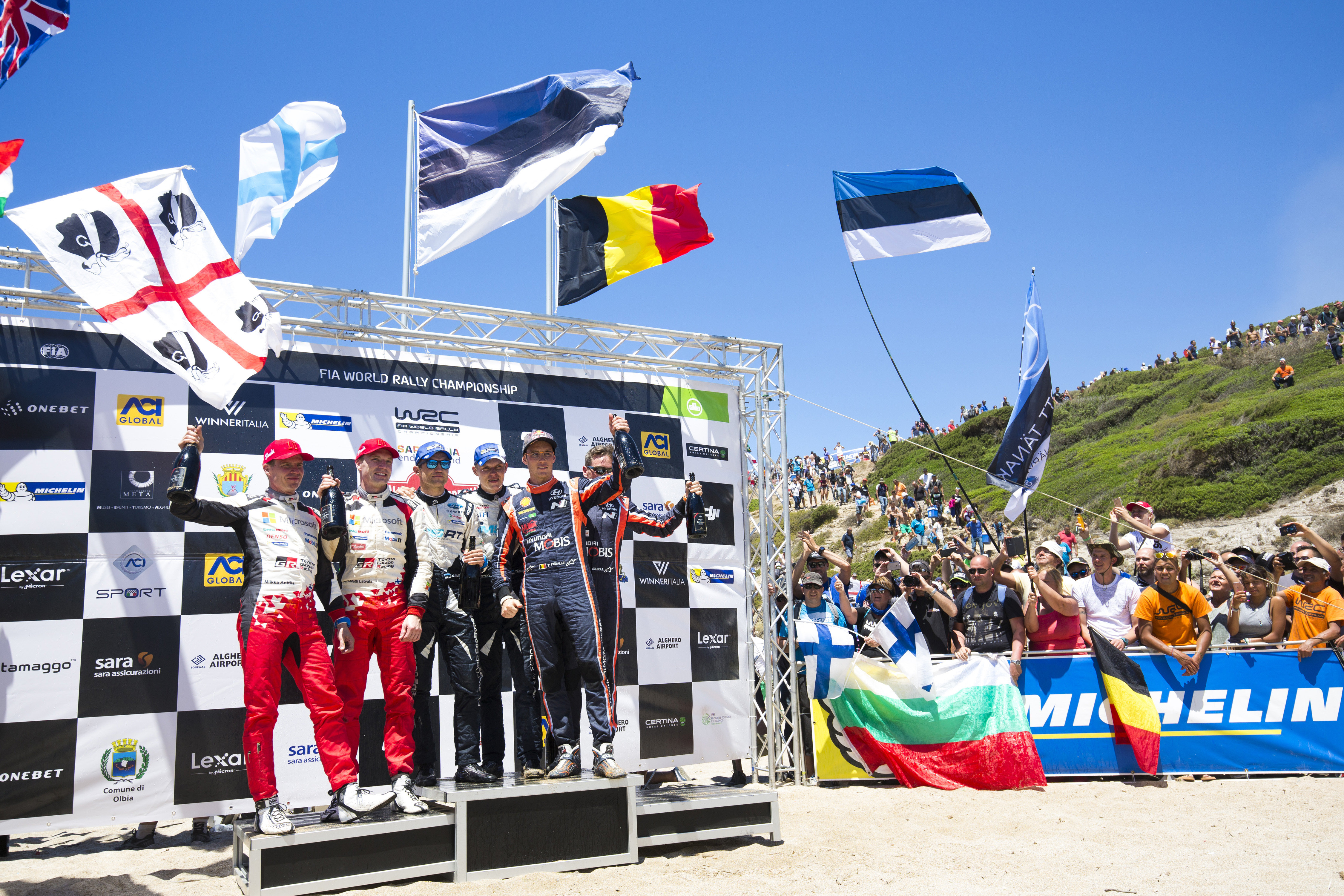 Le podium du rallye.